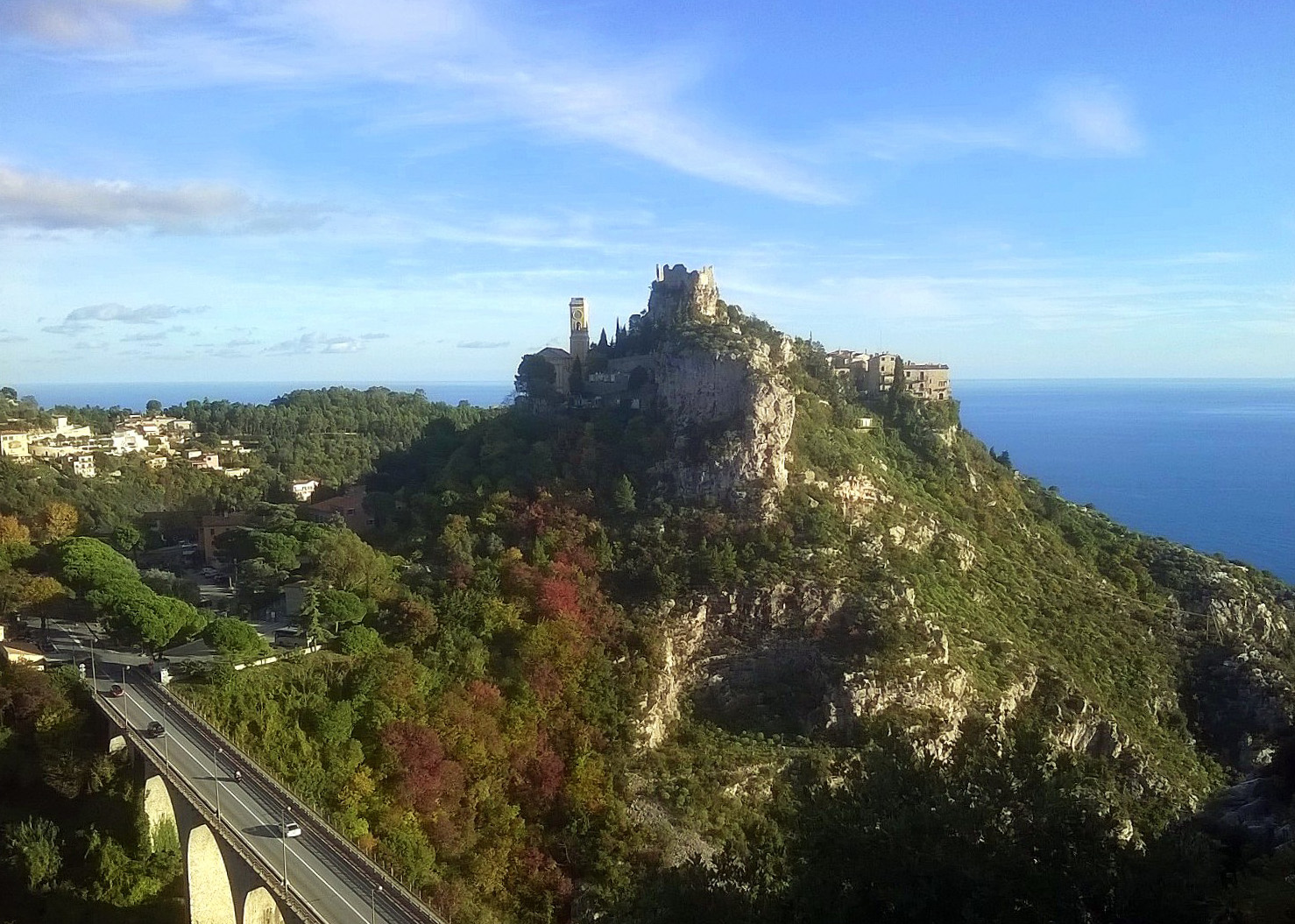 Le village d'Eze